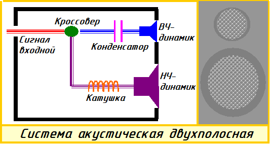 Устройство 2-х полосной акустической системы (русская версия уже имеющегося файла на испанском)